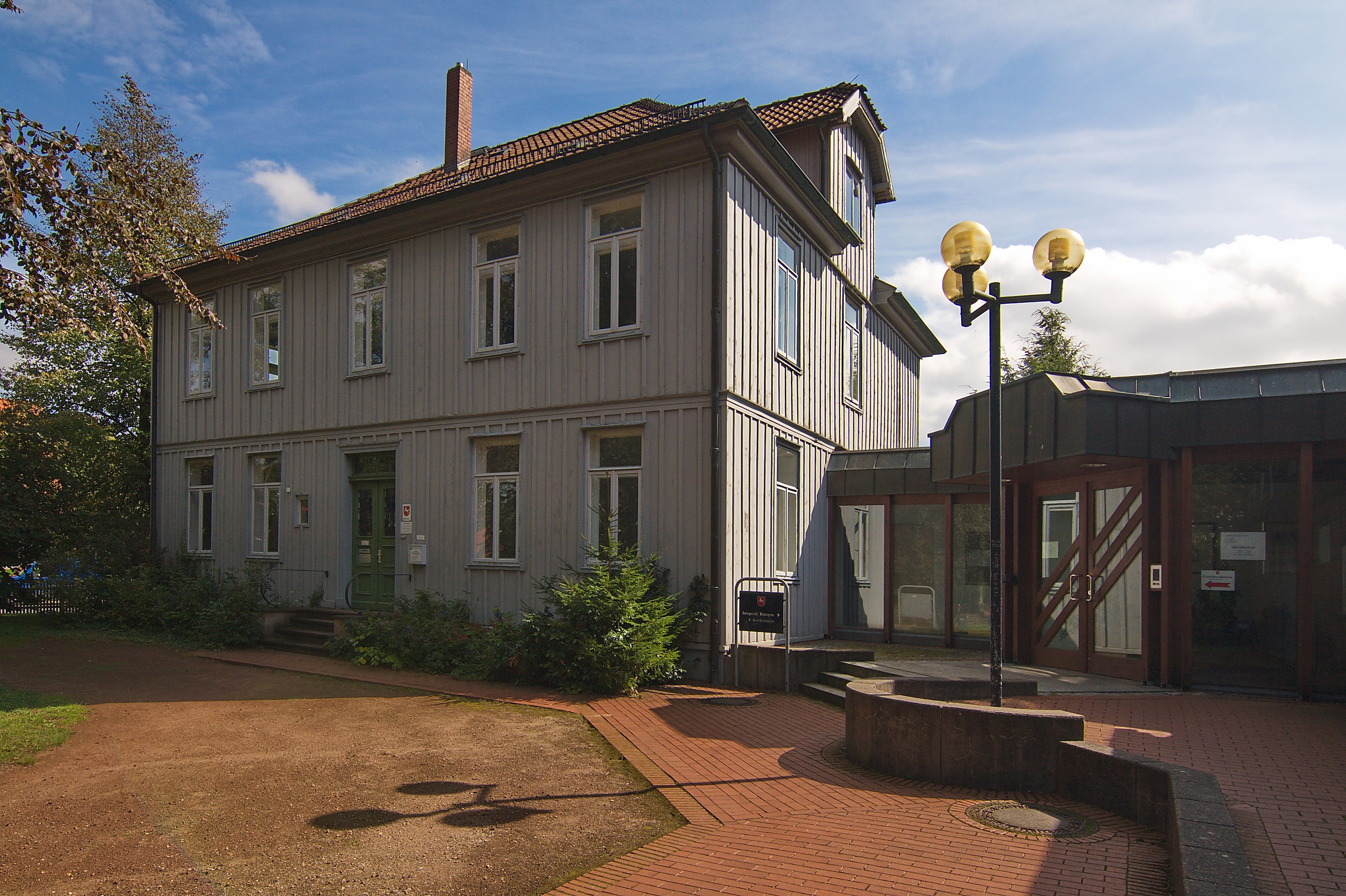 Ehemalige Villa Krogmann (heute Amtsgerichtsteil) in Wennigsen, Niedersachsen, Deutschland